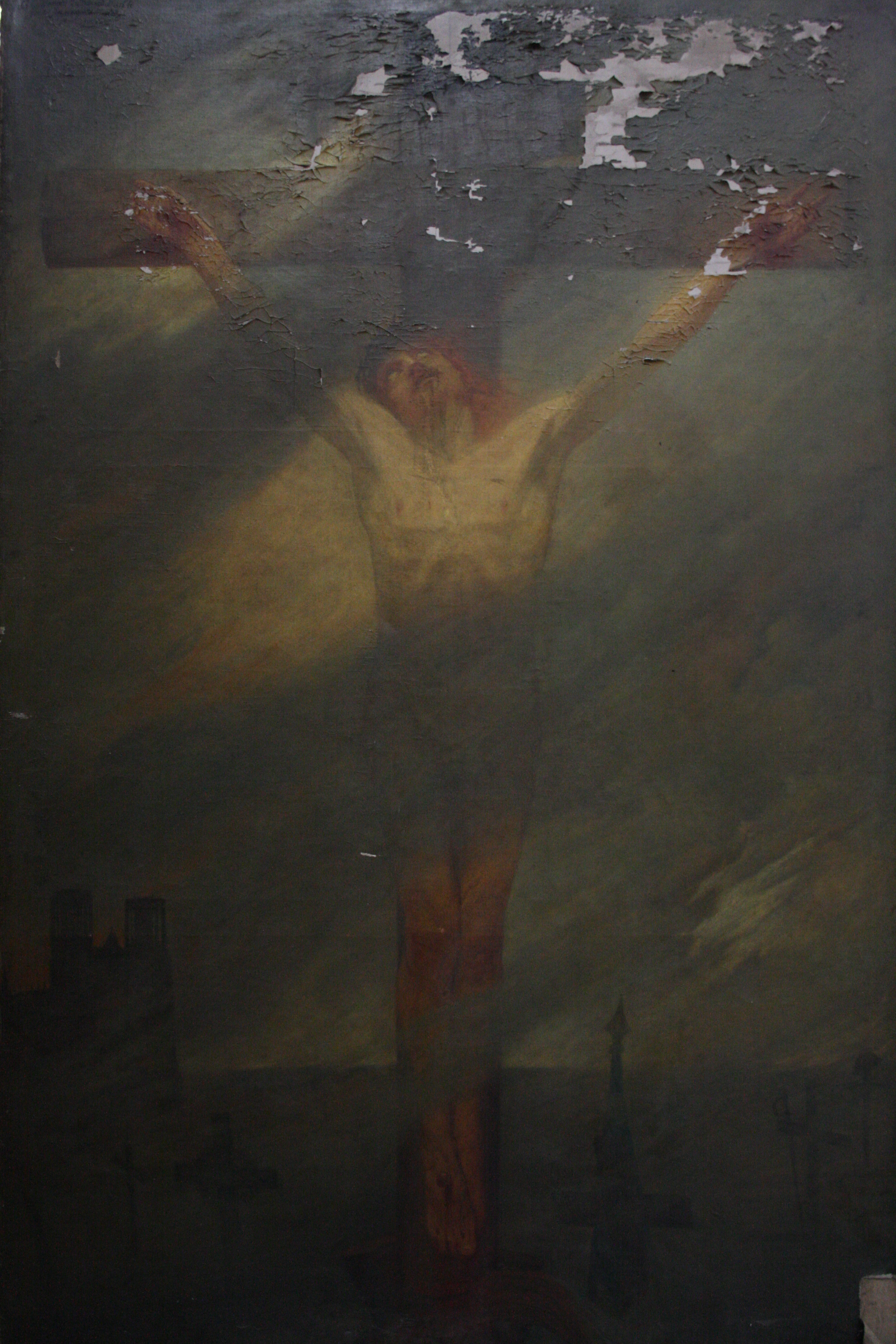 Tableau se trouvant en l'église saint maurice et peint en 1914, quelques semaines après les bombardements allemands qui enflammèrent la cathédrale.